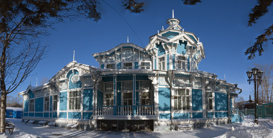 д. 71 по Красноармейской улице в Томске